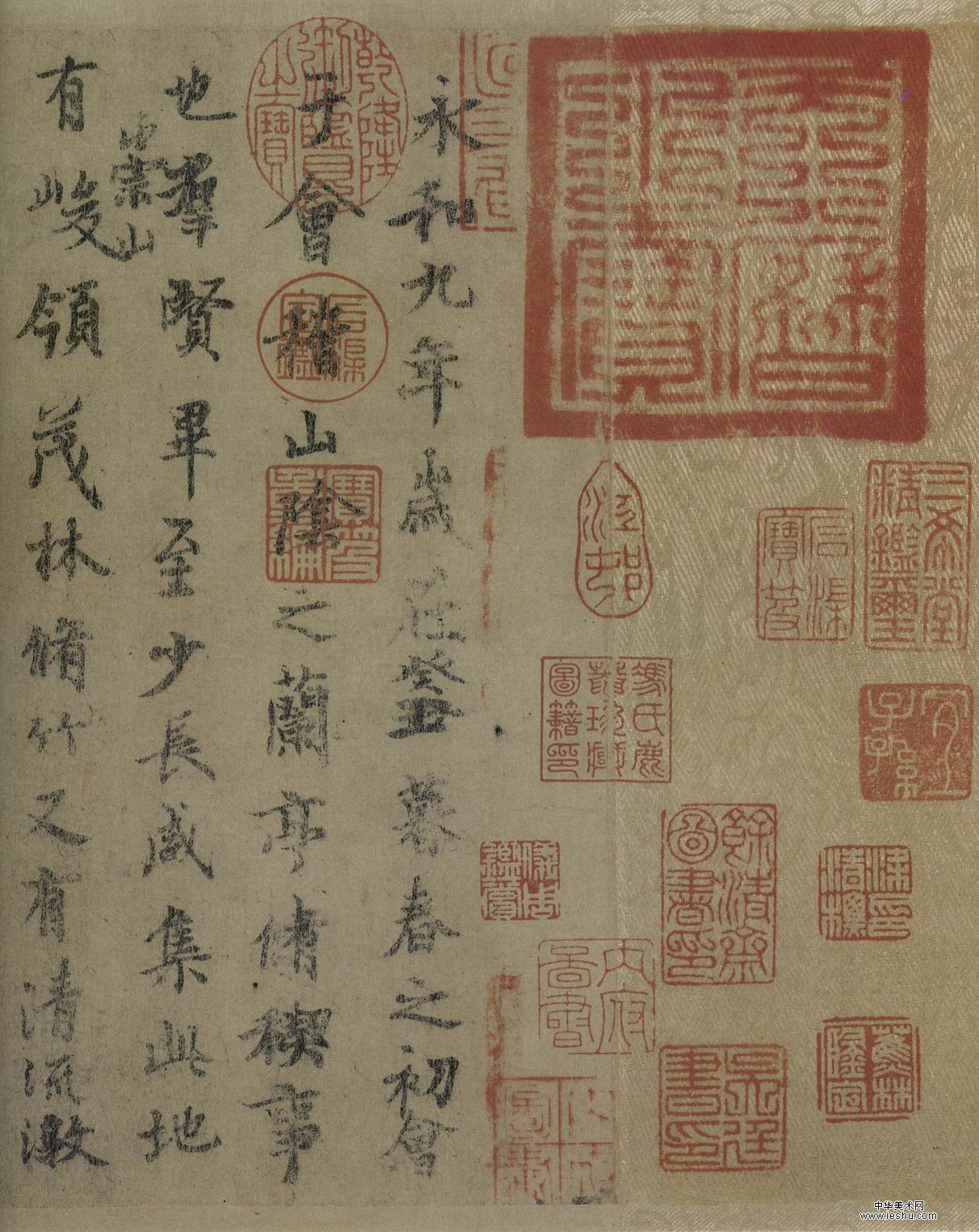 天曆本卷首天曆之寶印